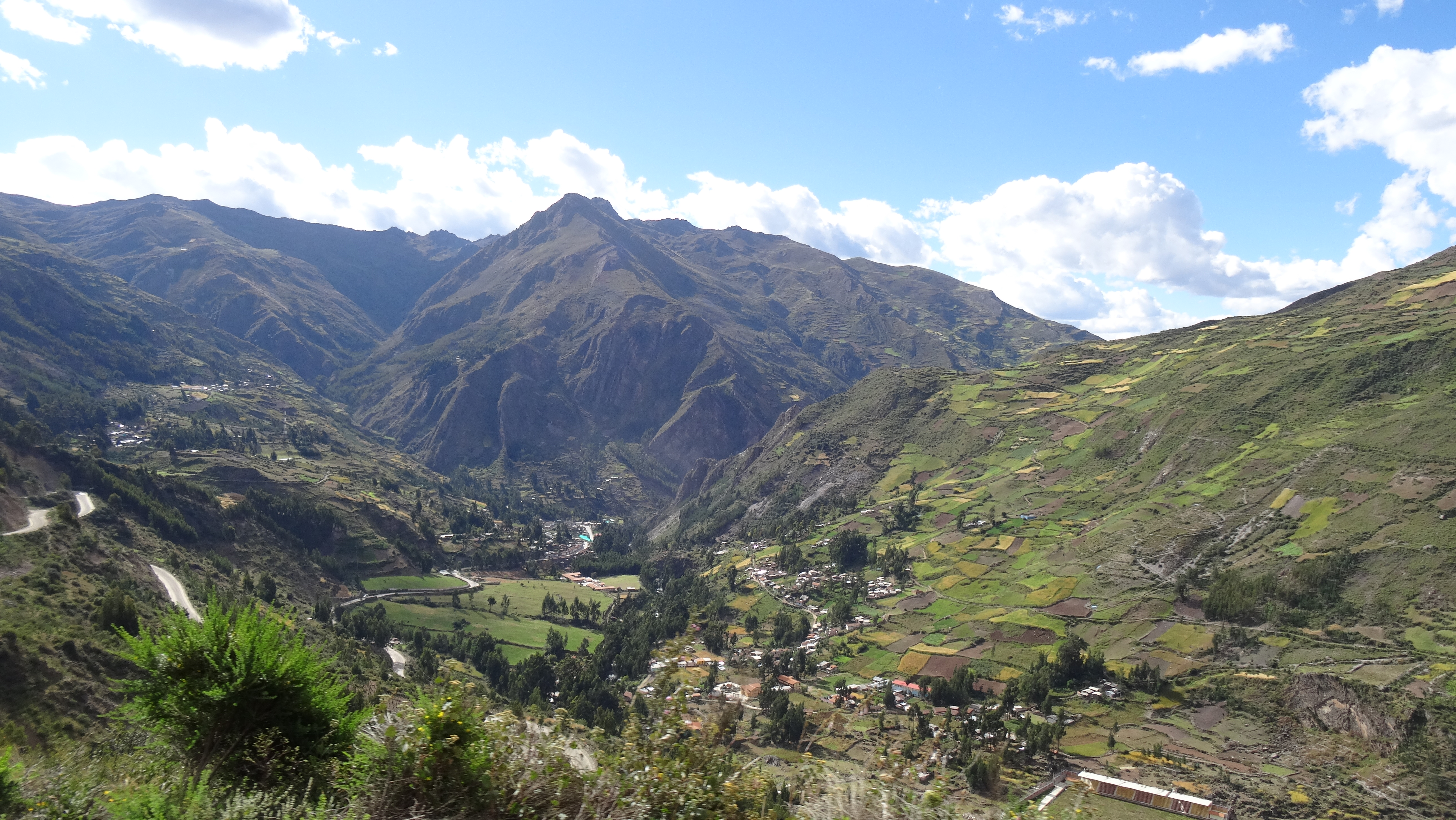 Parte del distrito de Chavín de Huantar, Santa Cruz del Mosna visto desde la vía Kahuish - Mosna.